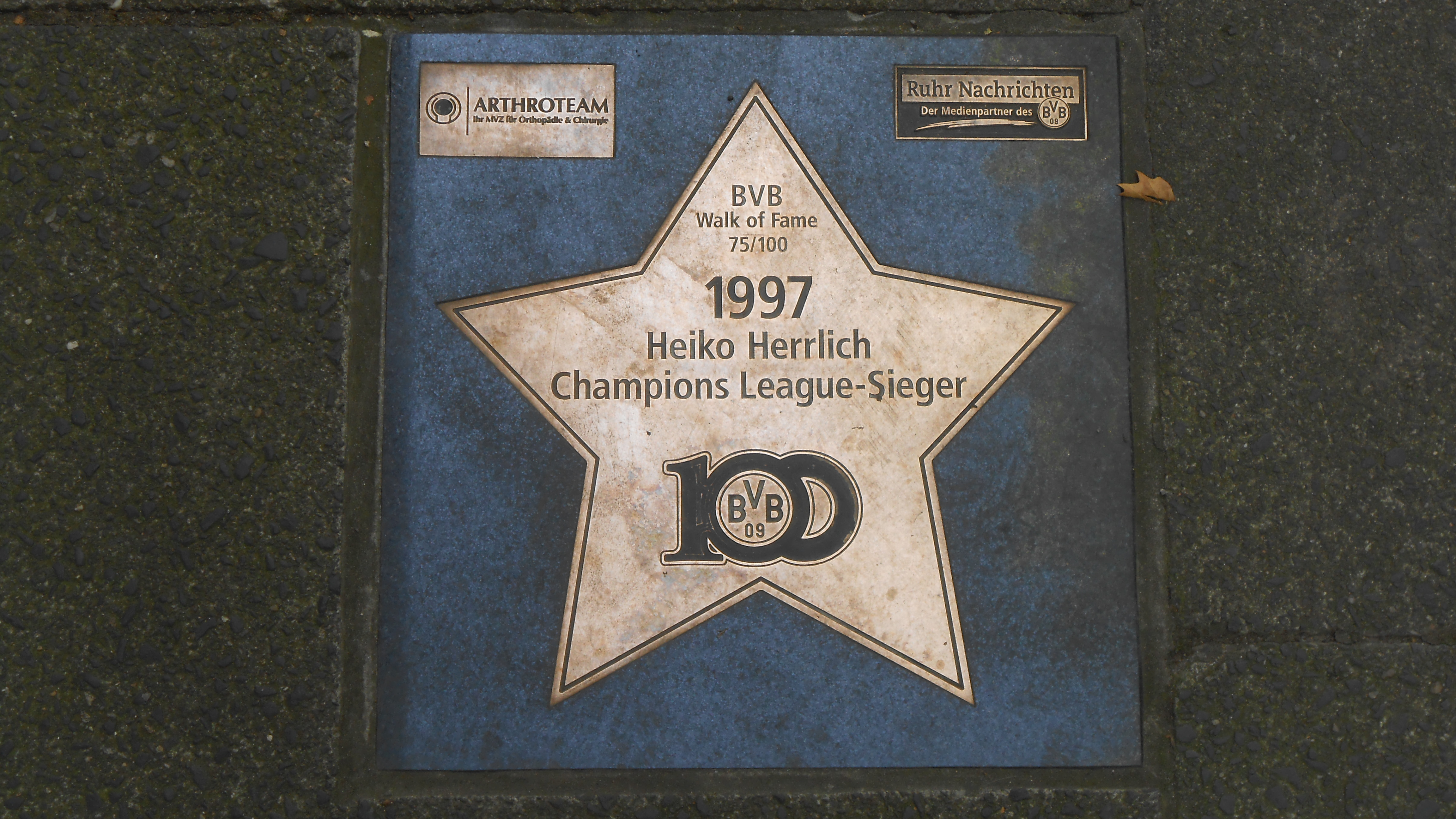 BVB Walk of Fame 75-100: 1997 Heiko Herrlich Champions Leage-Sieger